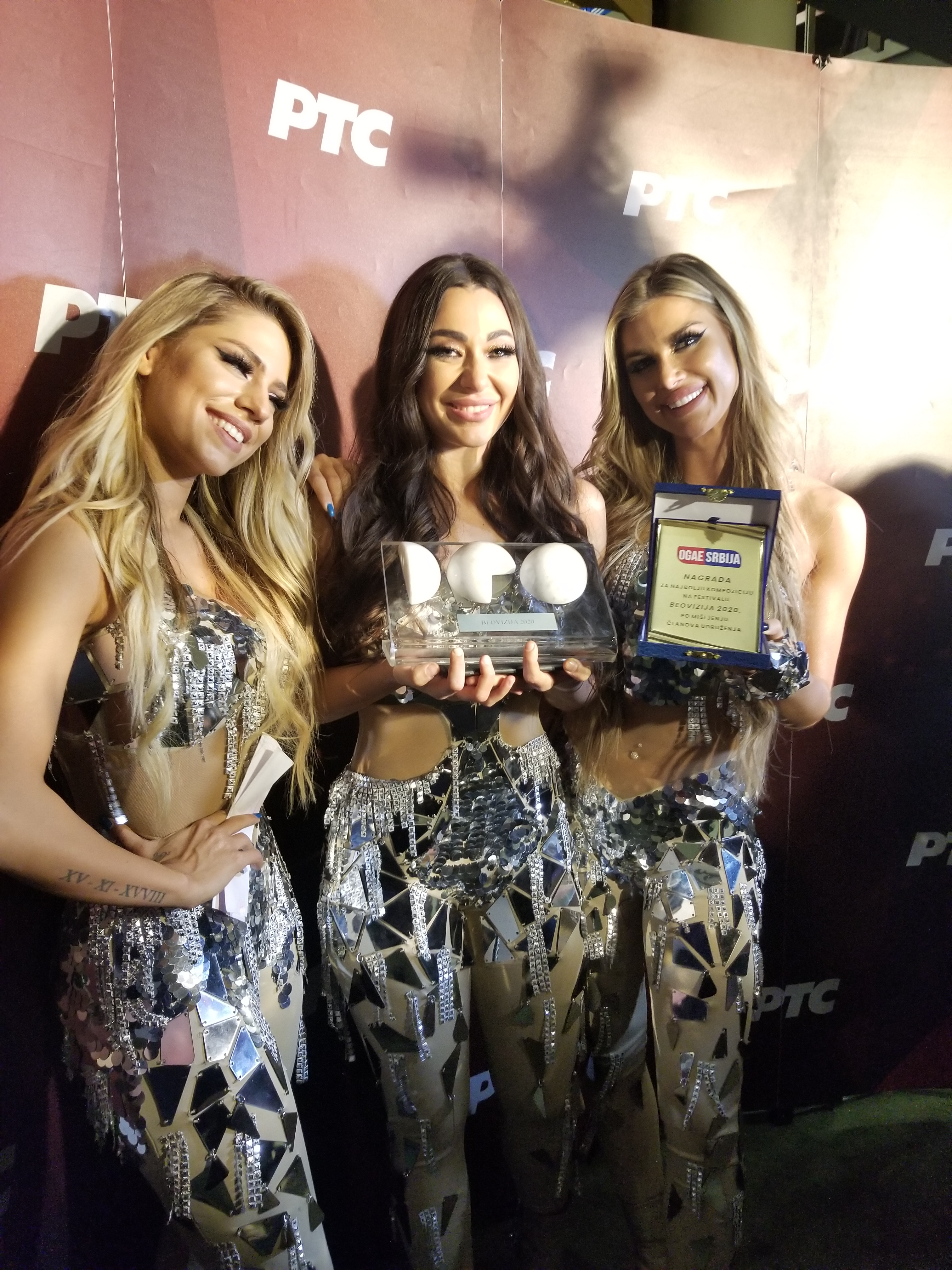 Харикејн са наградом ОГАЕ Србије